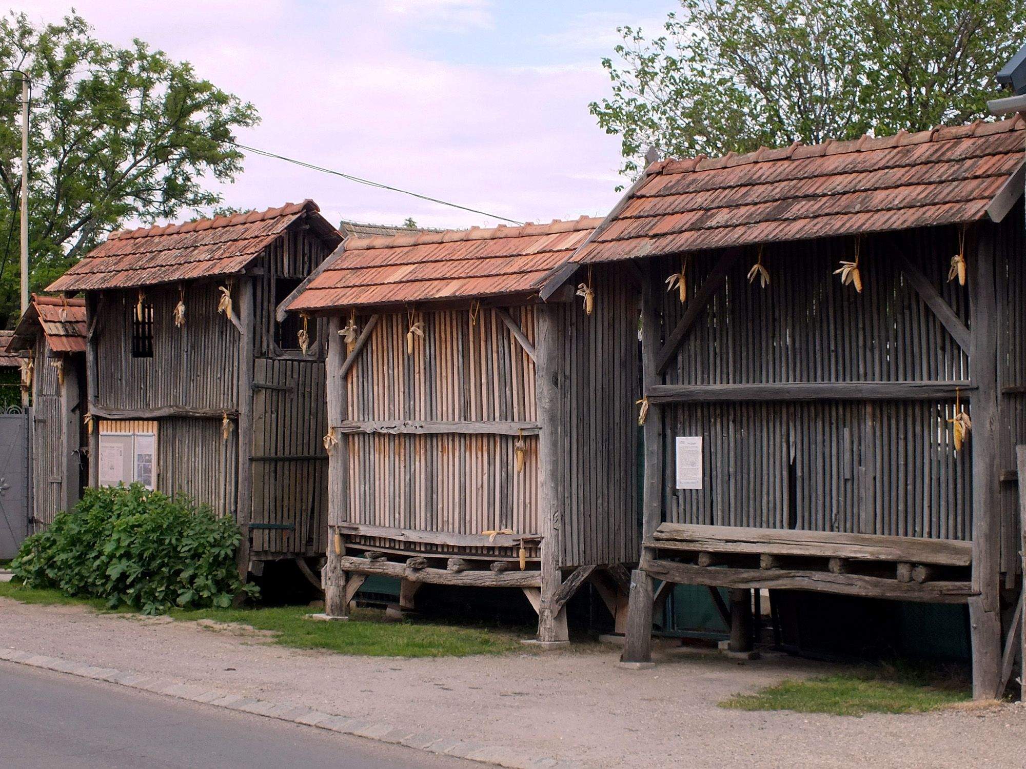 Tschardaken in der Tschardakenstraße in Halbturn (Burgenland, Österreich)